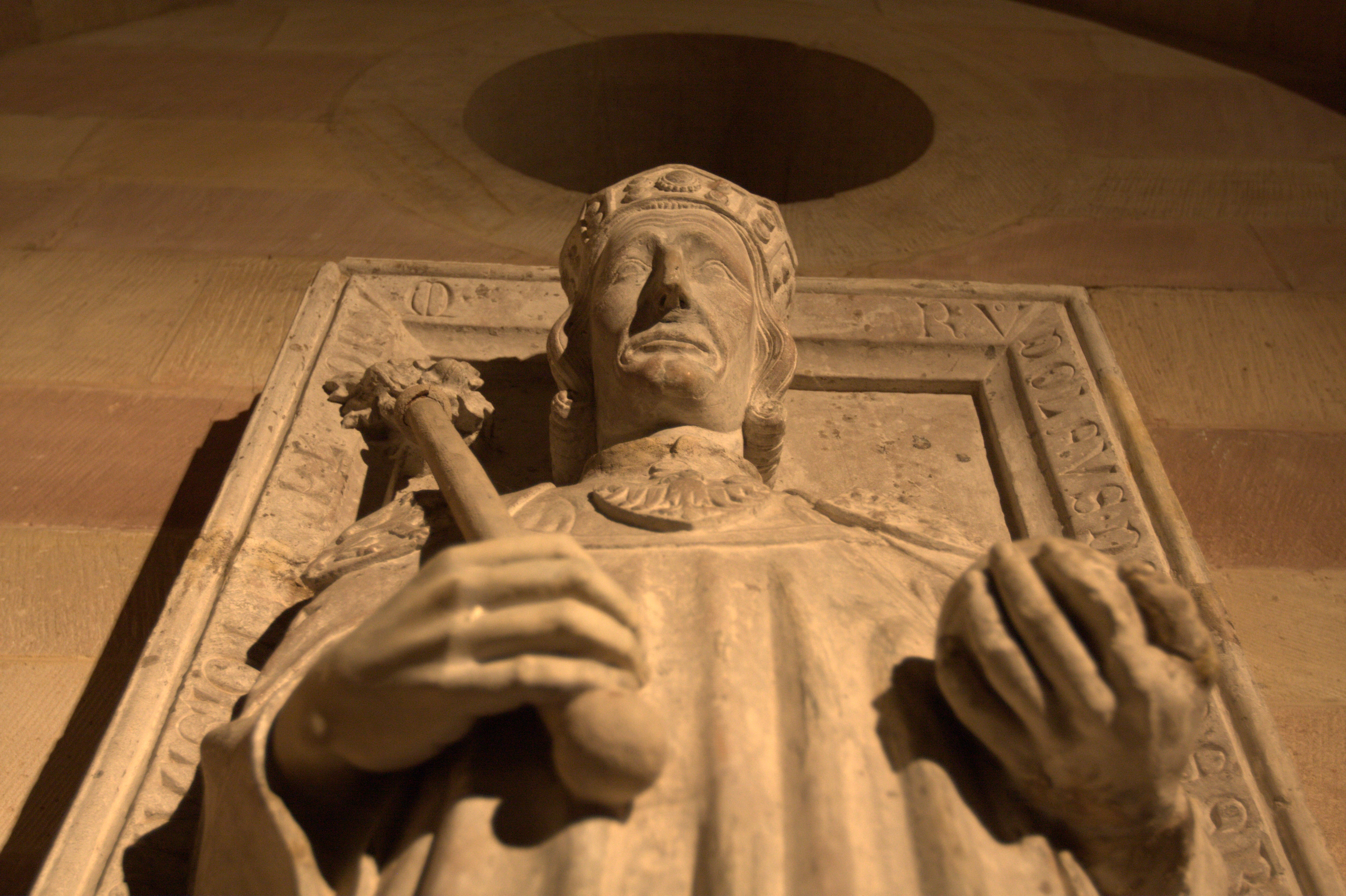 Grabplatte Rudolf I. von Habsburg in der Krypta im Dom zu Speyer